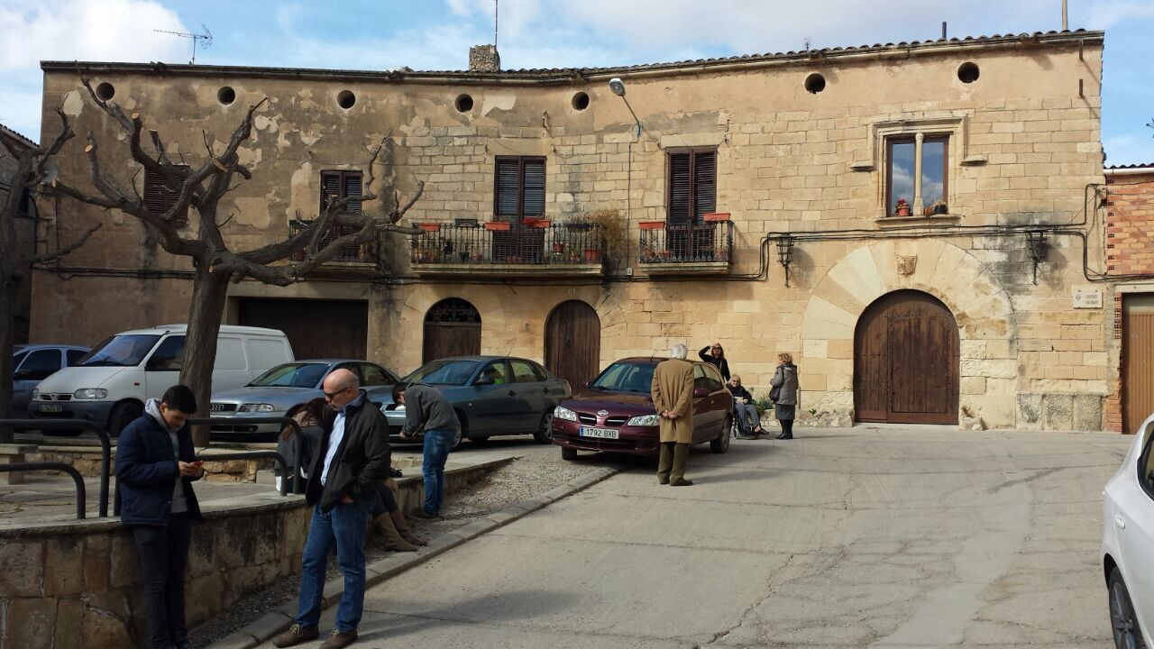 Cal Tarragó, un antic guistan àrab (segle VIII) amb honors de castell, al voltant del qual s'ordenà el poblat conegut com a Beni-Aixa, del qual pren el nom l'actual municipi de Vinaixa